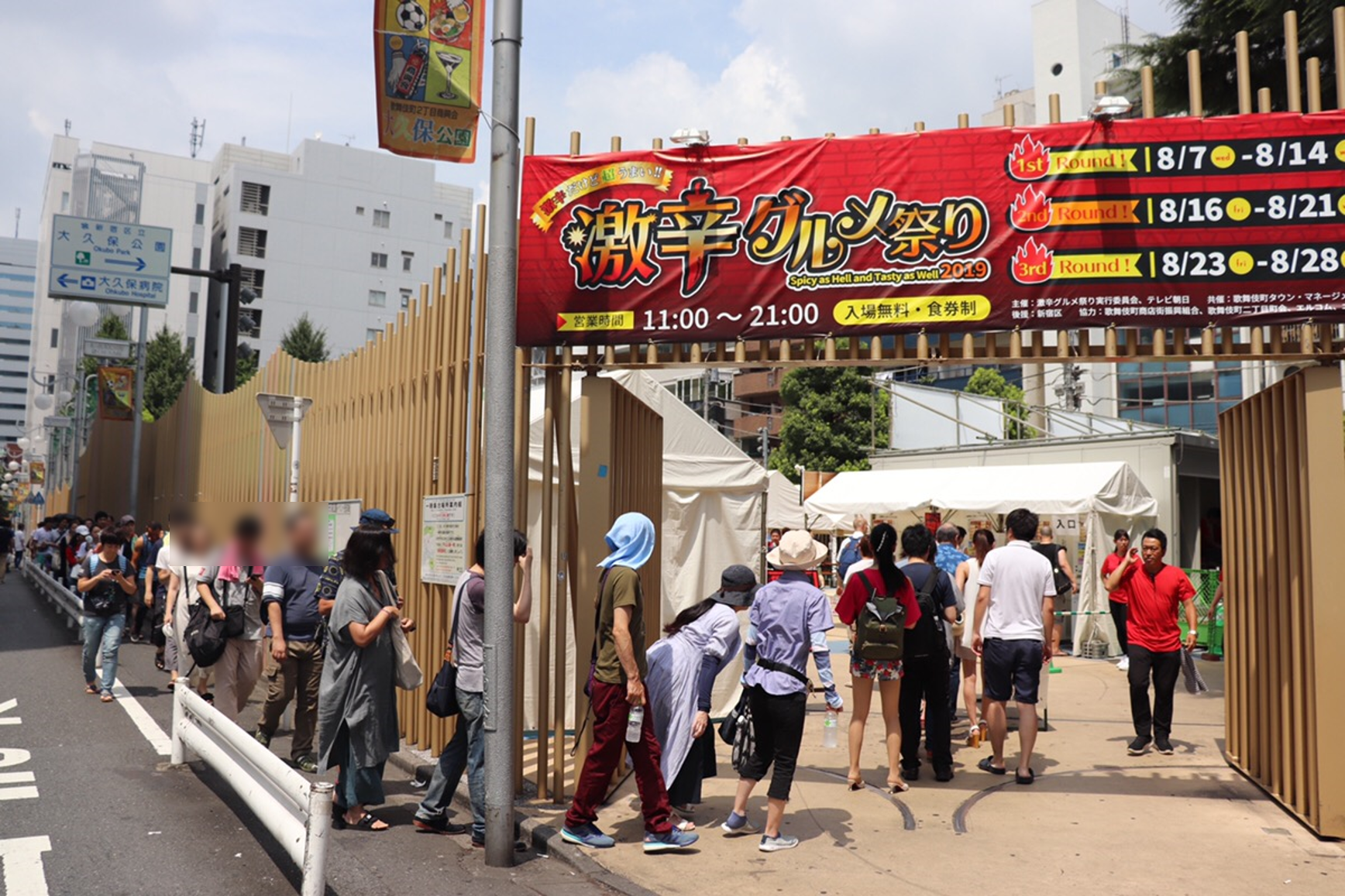 GEKIKARA2019